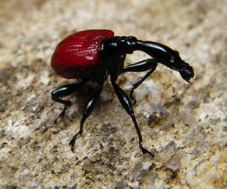 Trachelophorus giraffa, female, Ranomafana, Madagascar